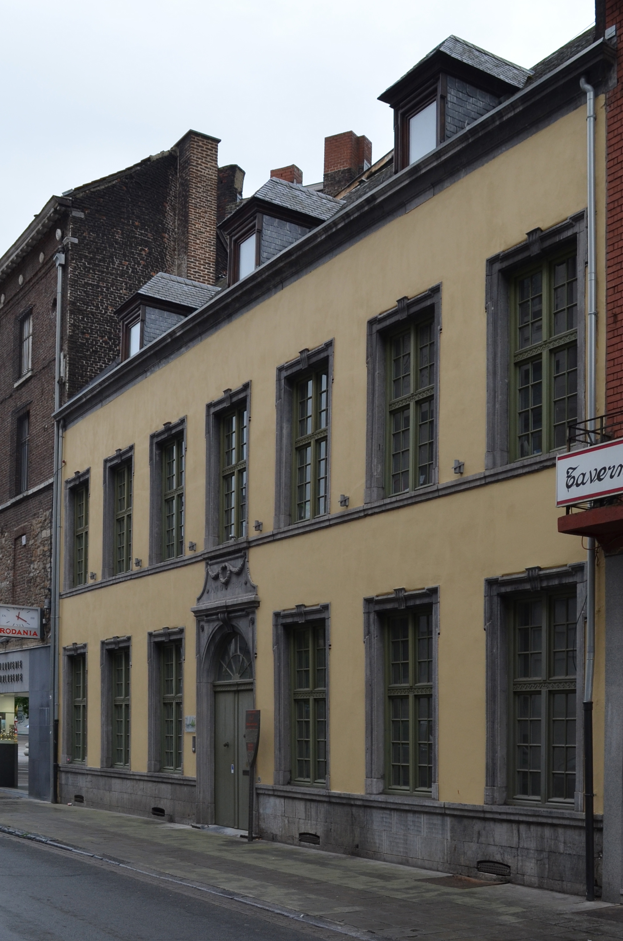 Charleroi (Belgique) - Maison du bailli